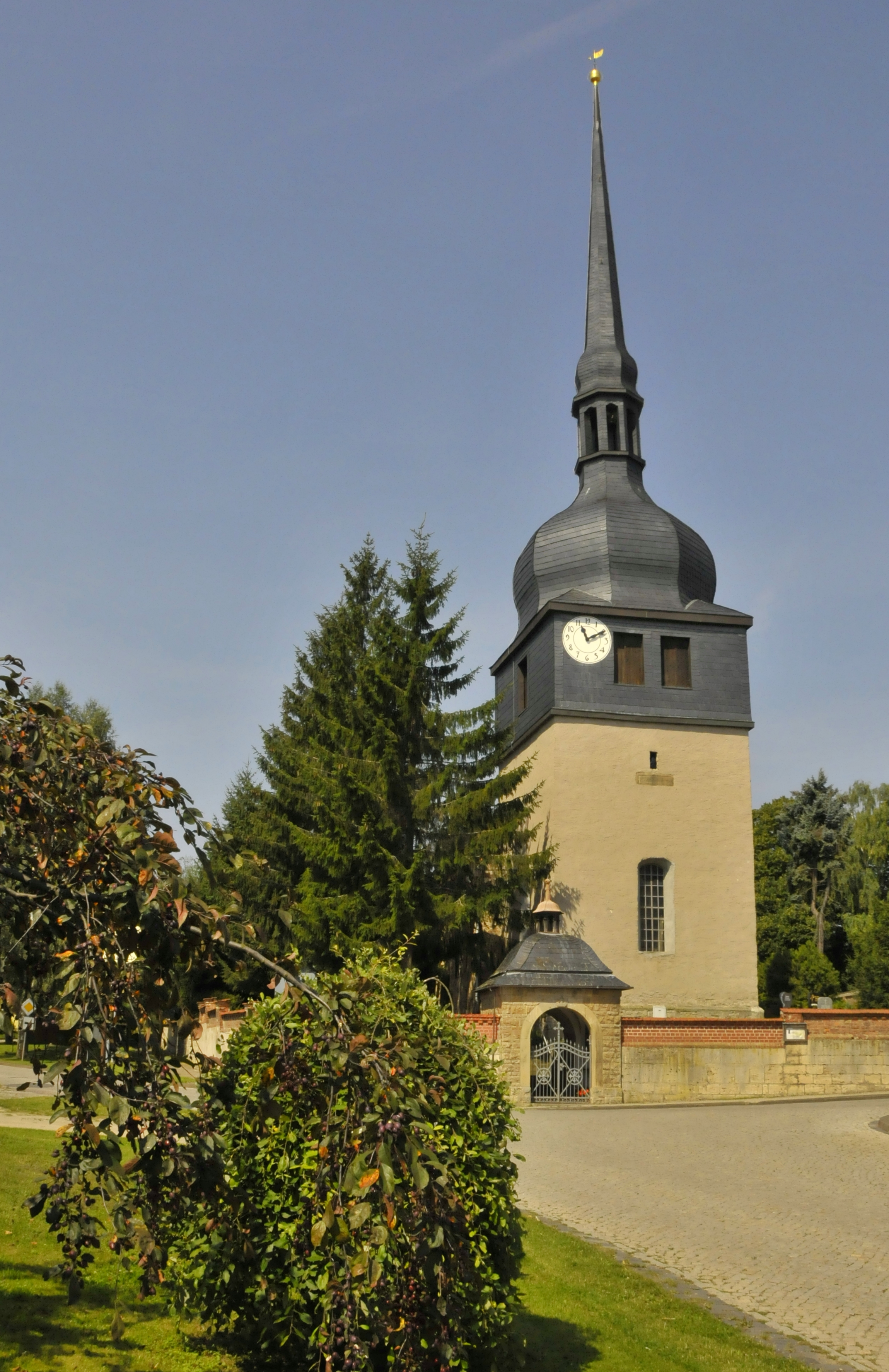 Ambnrosiuskirche in Haussömmern